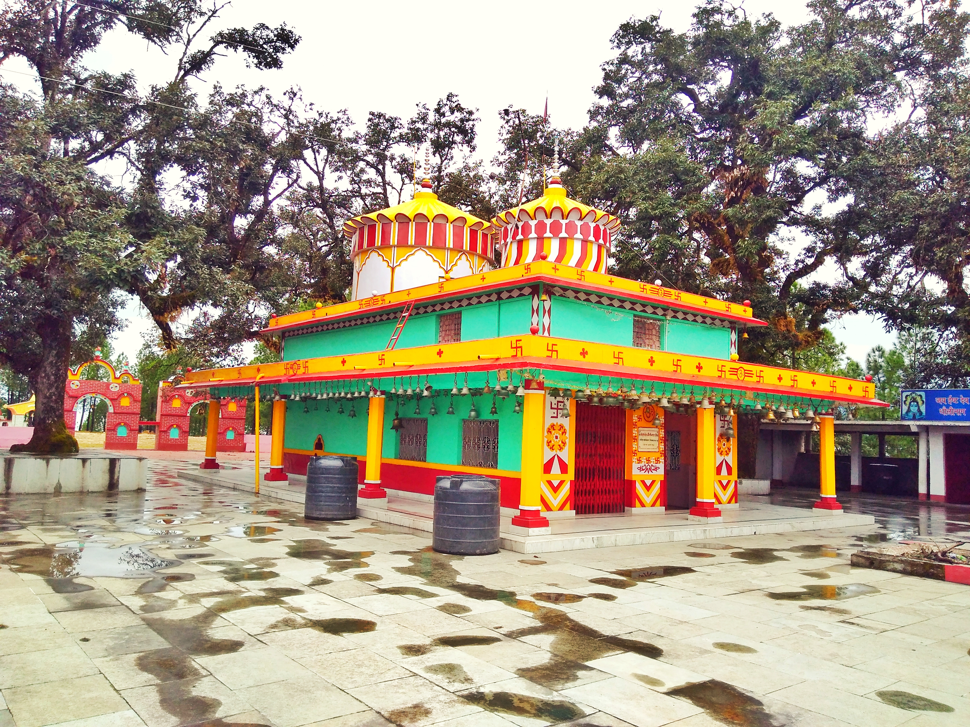 Dhaulinag temple - Vijaypur, Uttarakhand, India